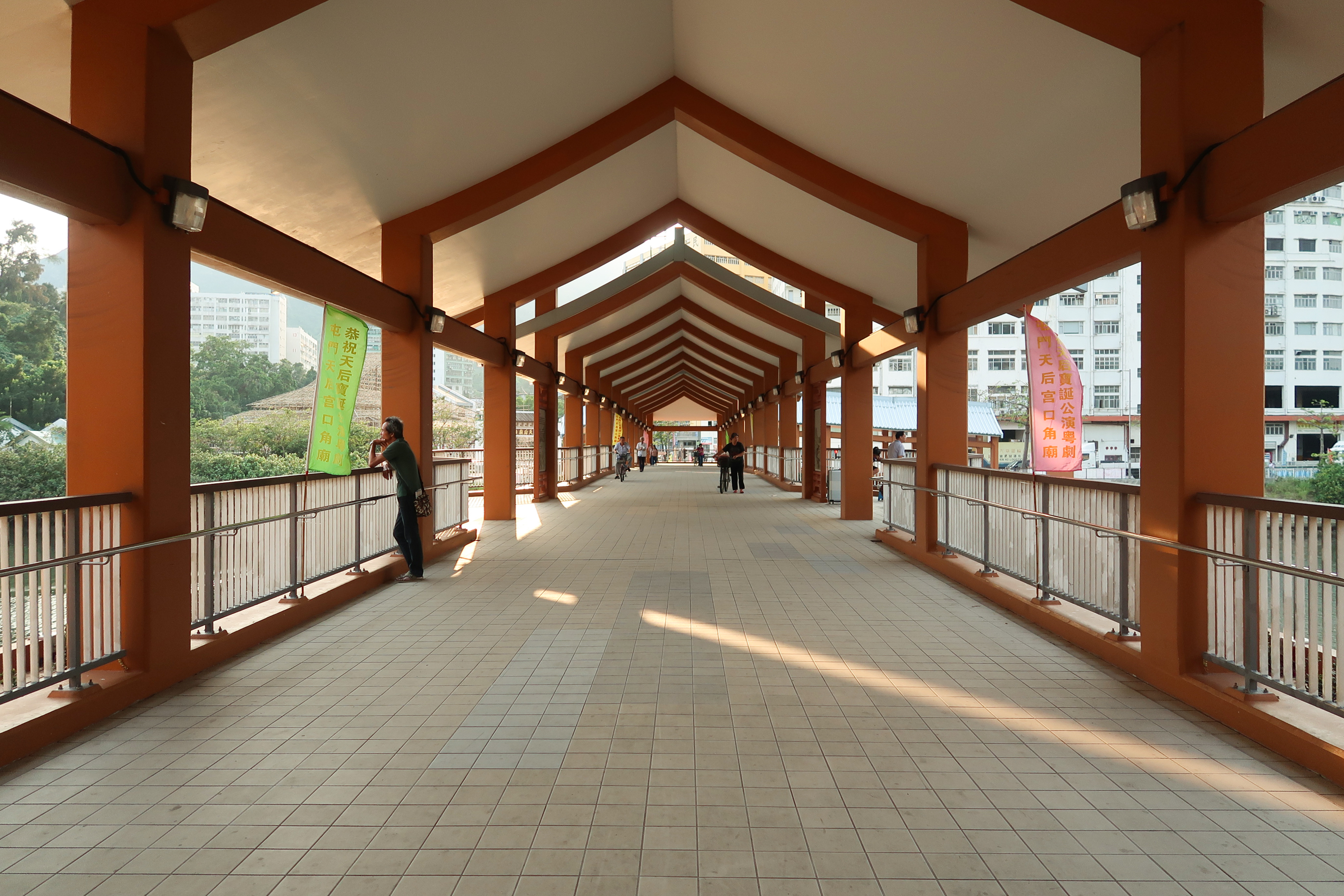 Tin Hau Bridge